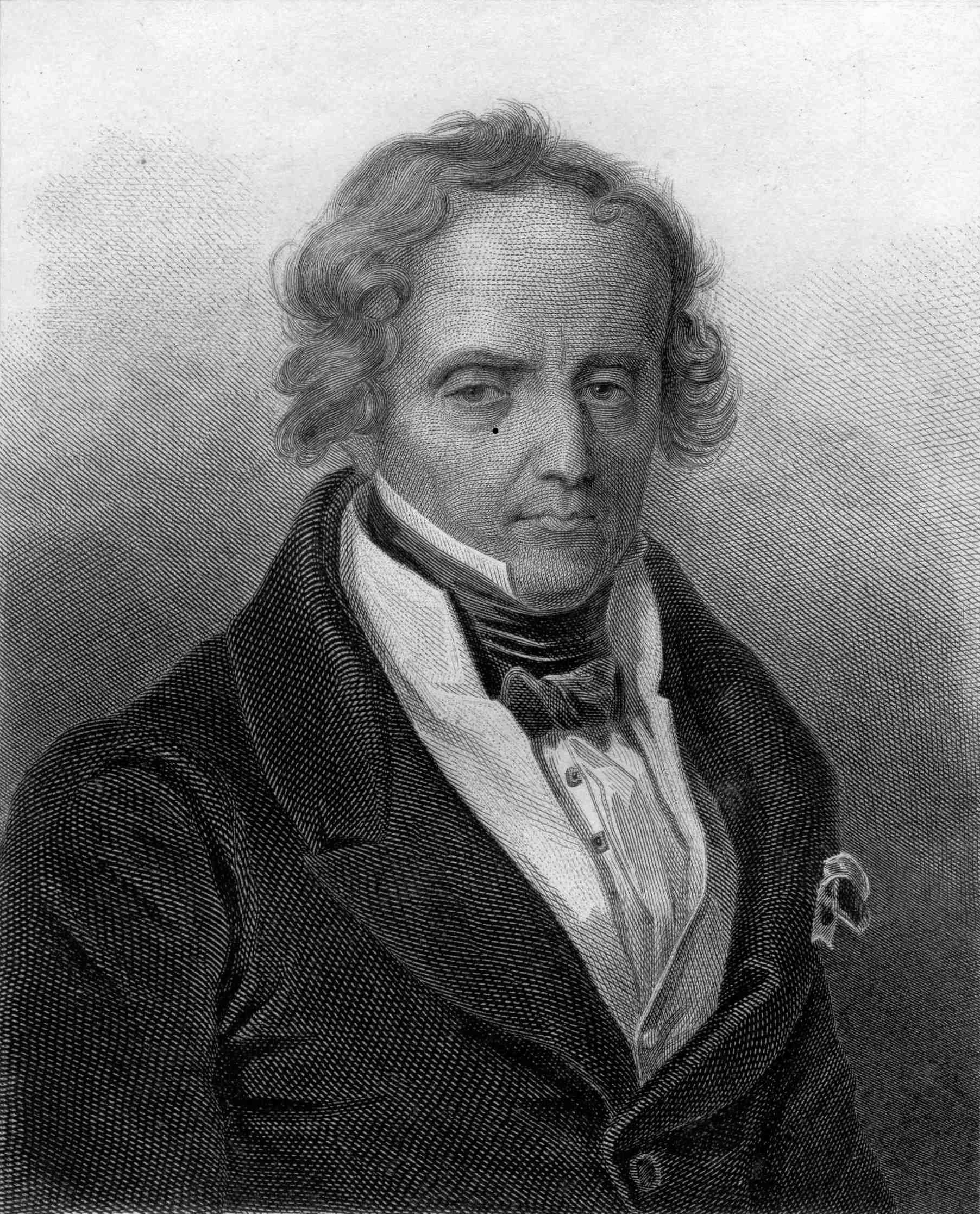 French writer Xavier de Maistre (1763-1852)